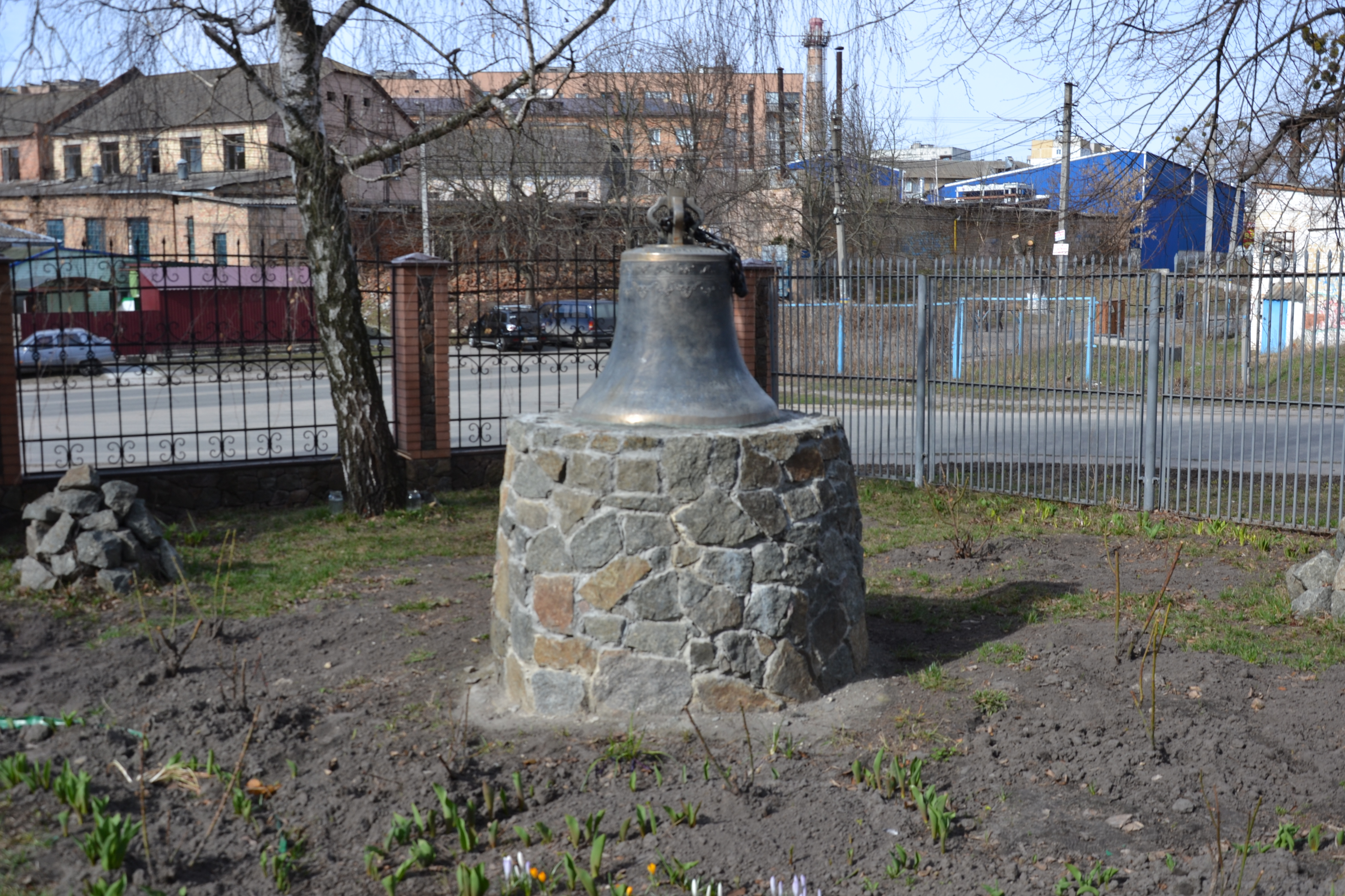 Миколаївська церква в м.Васильків, дзвін у дворі